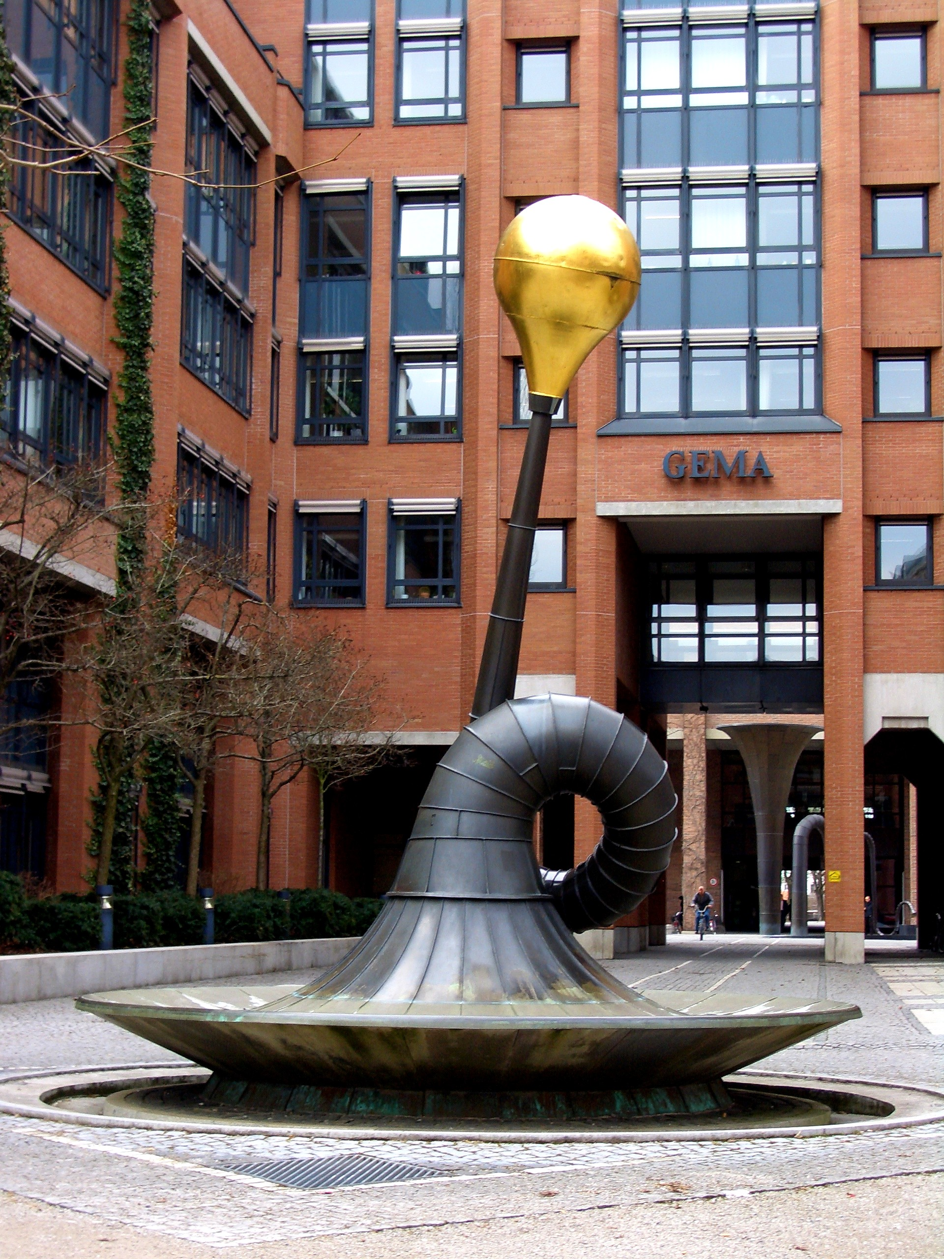 Erich-Schulze-Brunnen in Muenchen Haidhausen Element Hupe von Albert Hien, im Hintergrund ein Schild der GEMA